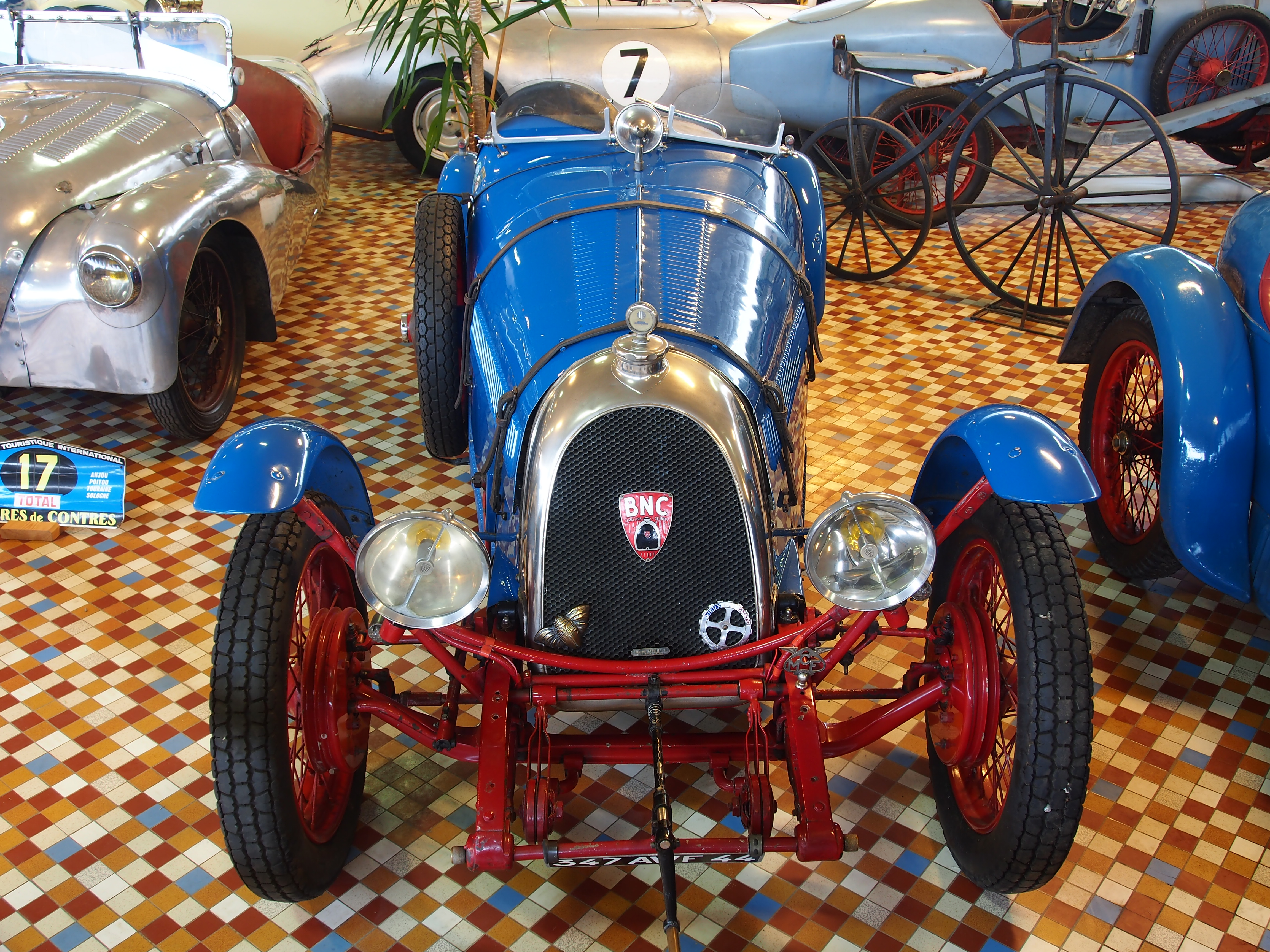 Photographed at the Musée Automobile de Vendée, France.